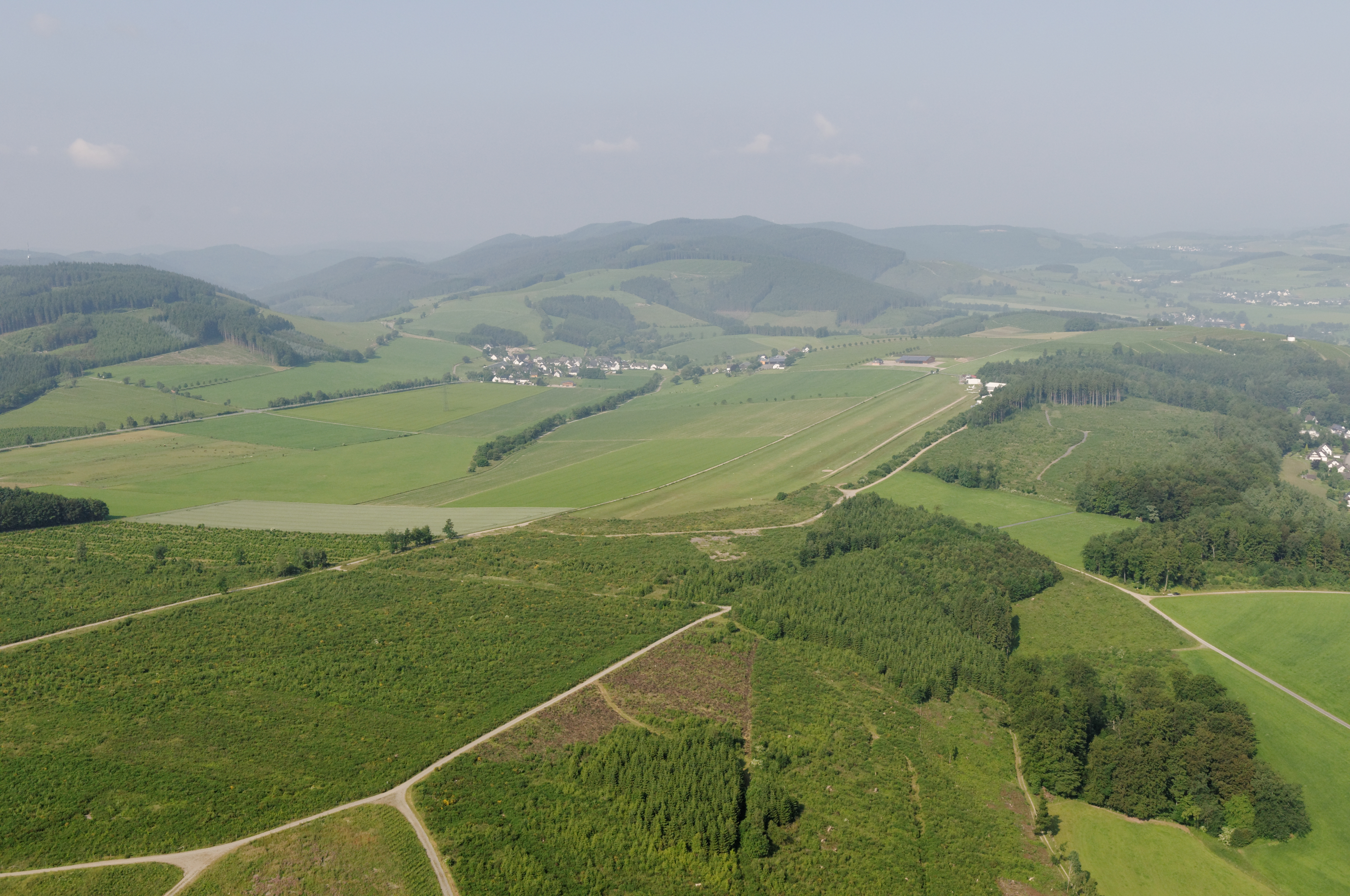 Fotoflug Sauerland-Ost: Schmallenberg über dem Wormbacher Berg. Blick Richtung Westen auf den Flugplatz Schmallenberg-Rennefeld und Werpe. The making of this document was supported by the Community-Budget of Wikimedia Germany.